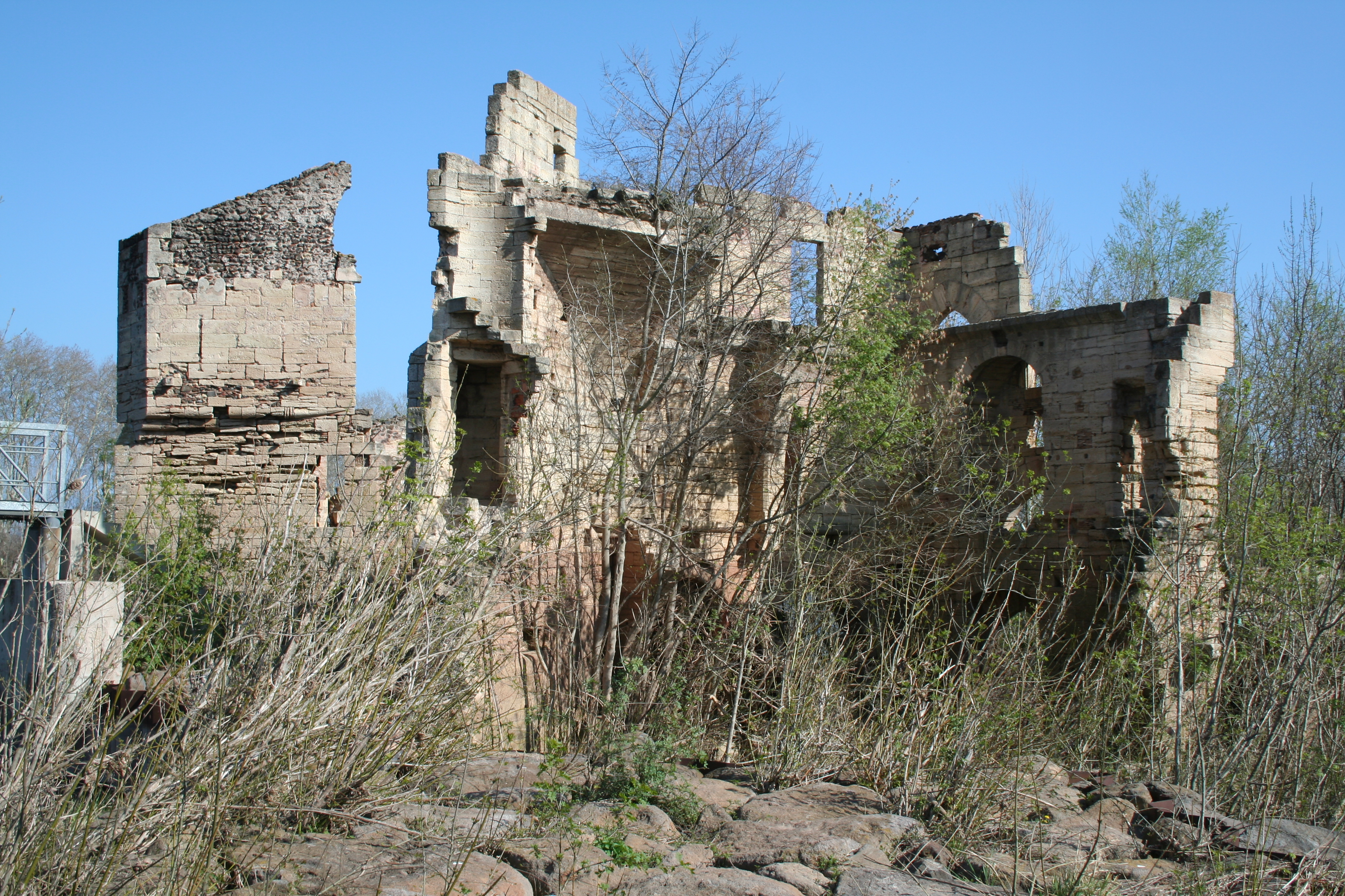 Bessan - ruines du moulin des évêques d'Agde - Hérault.